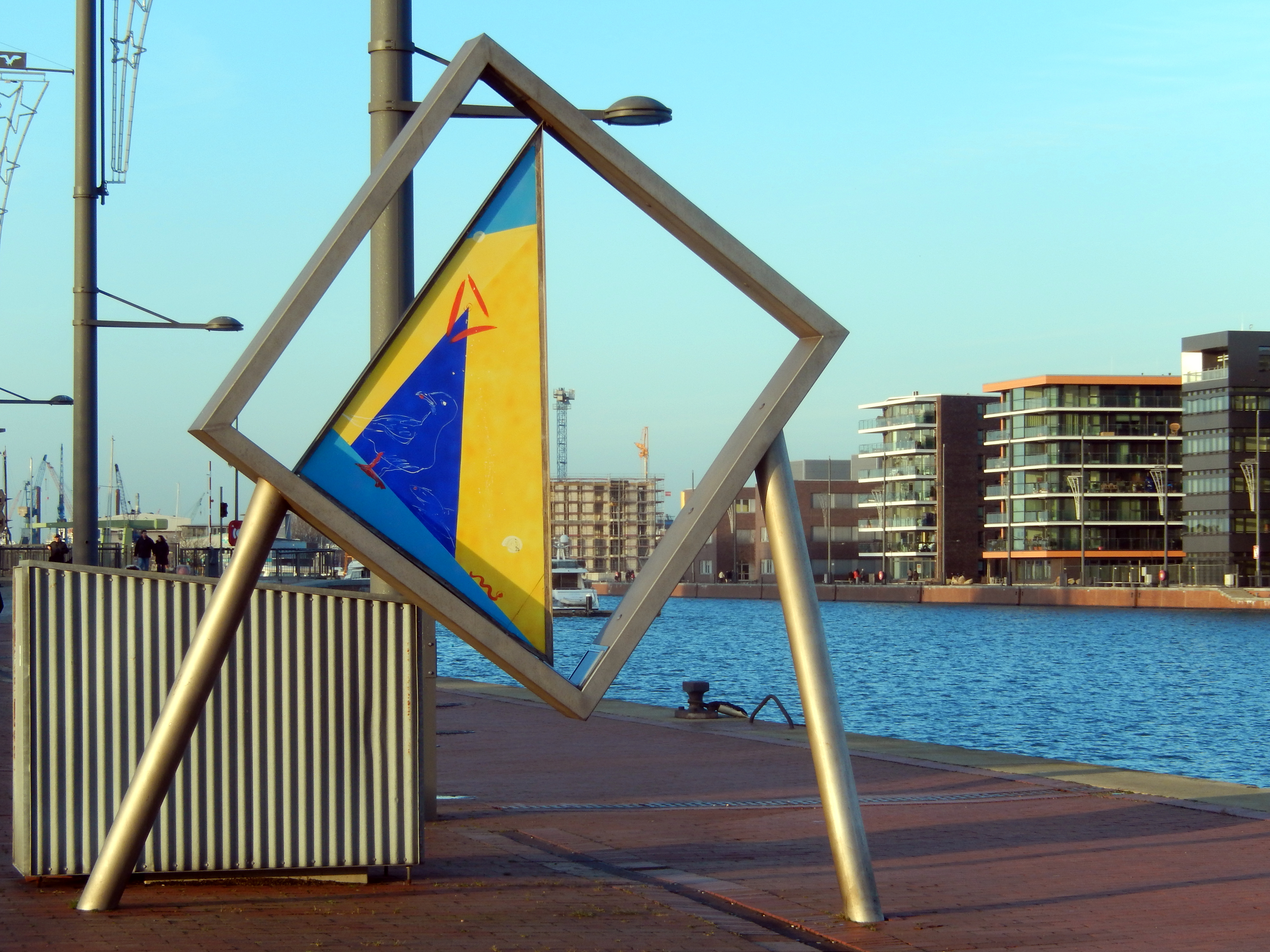 Mitte